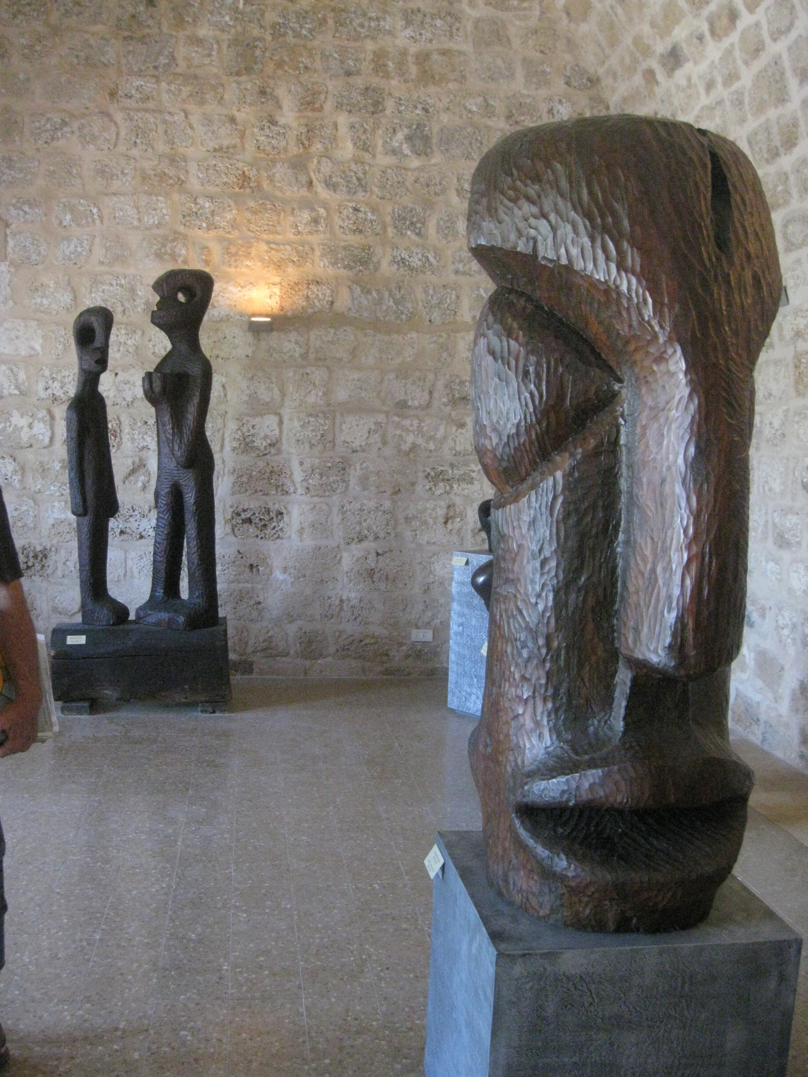 מוזיאון אחיעם לפיסול בפארק שוני בבנימינה